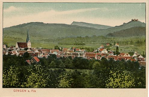 Ansichtskarte von Gingen an der Fils von 1900.